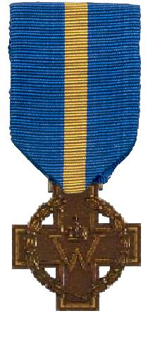 Het Nederlandse " Kruis van Verdienste". Particuliere verzameling. Groningen